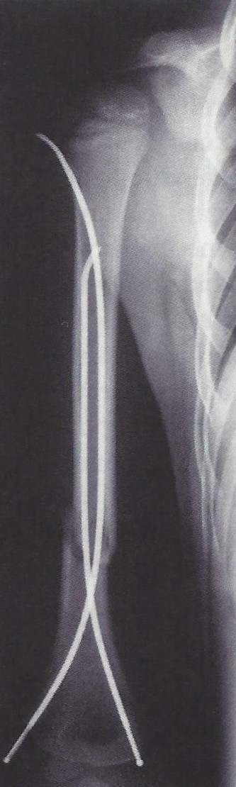 Distale Humerusschaftfraktur bei 6-jährigem Mädchen, versorgt mit zwei retrograden Prévôt-Nägeln.